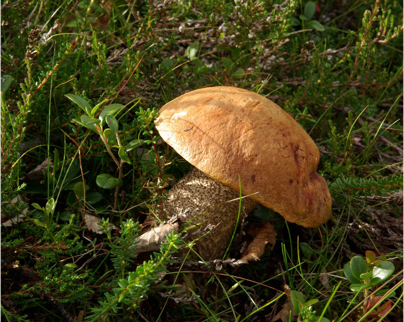 Leccinum versipelle, Heiderotkappe, Birkenrotkappe Fundort: Nordschweden, lichter Fichten-/Birkenmischwald